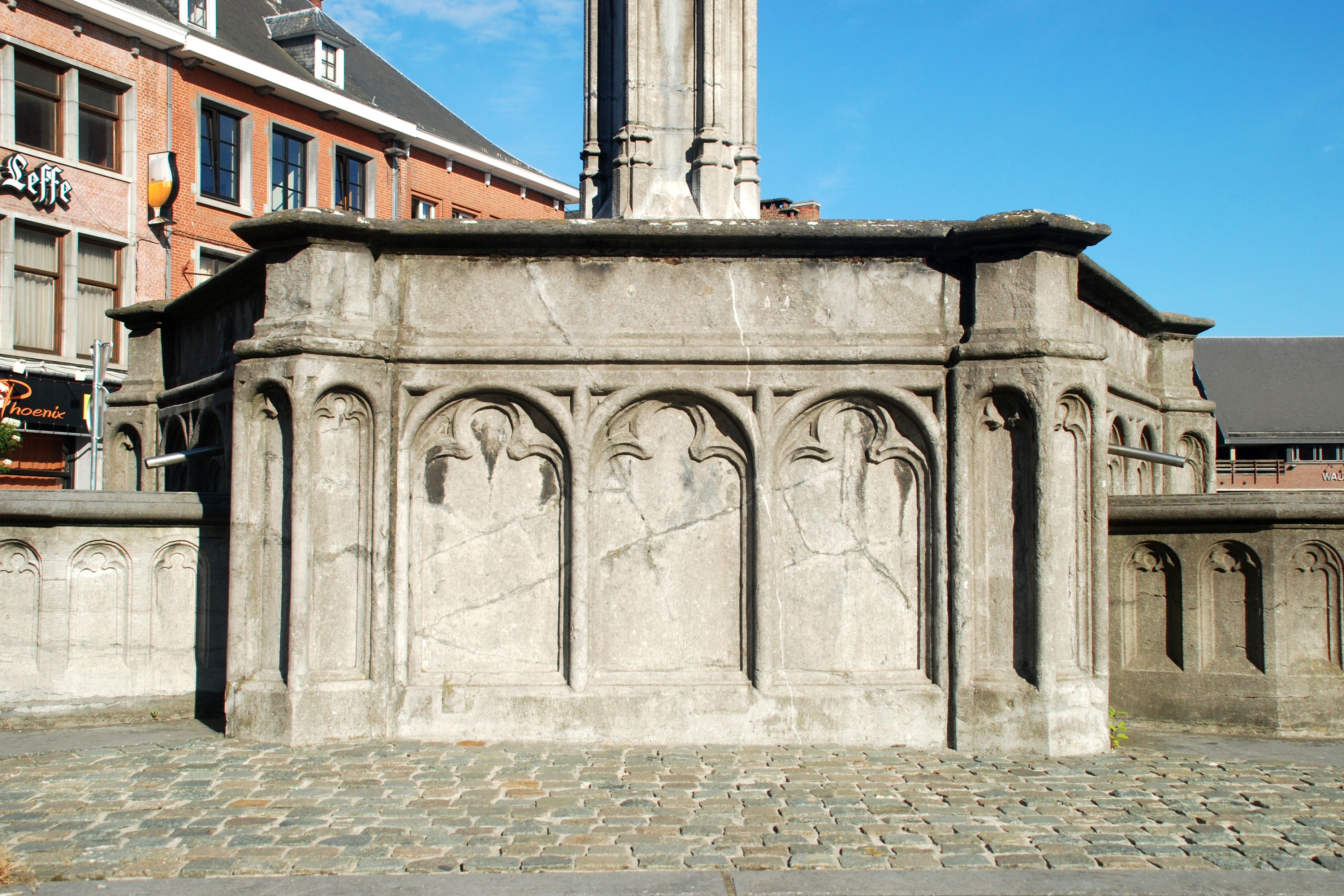 Belgique - Brabant wallon - Fontaine-perron de Nivelles